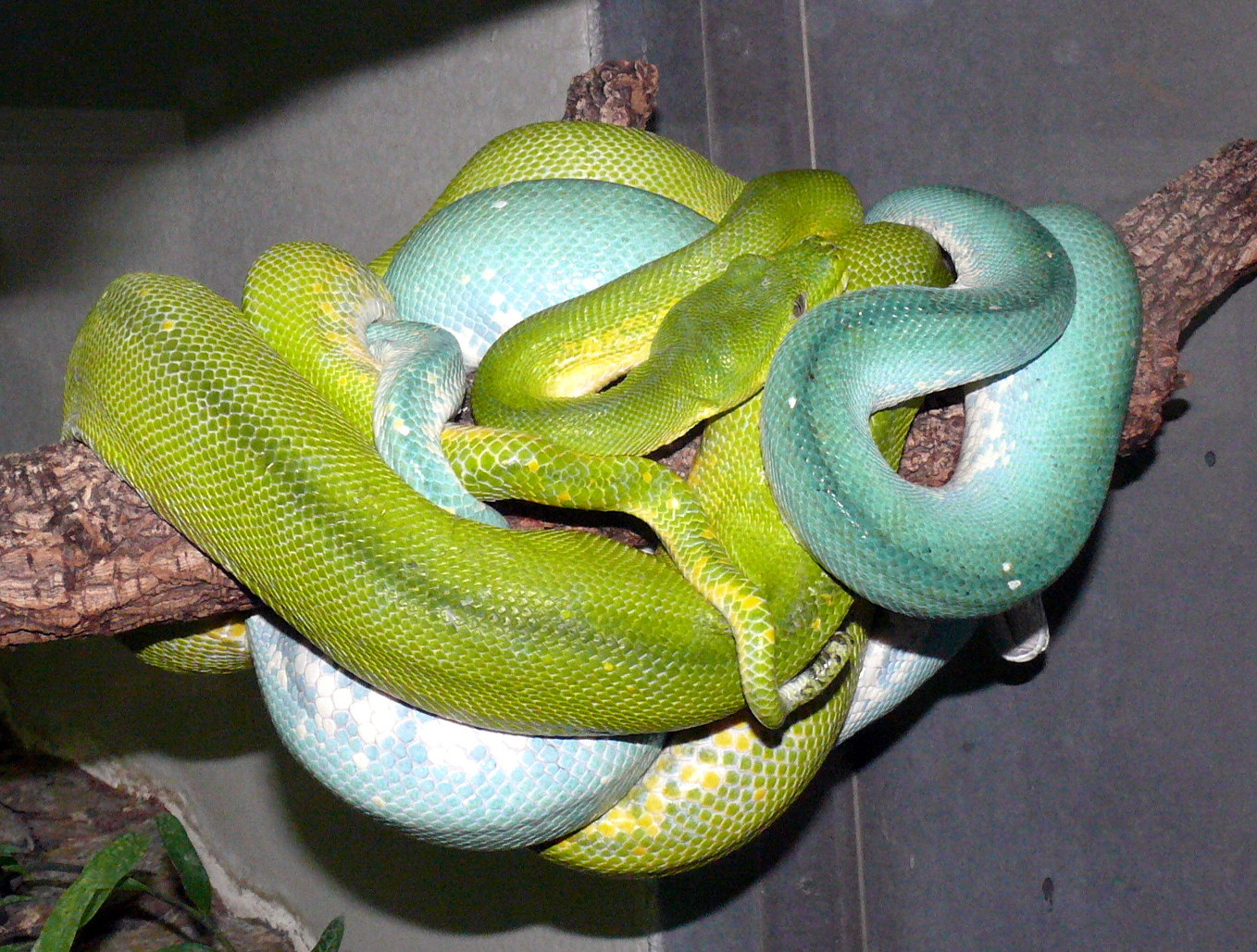 Morelia viridis